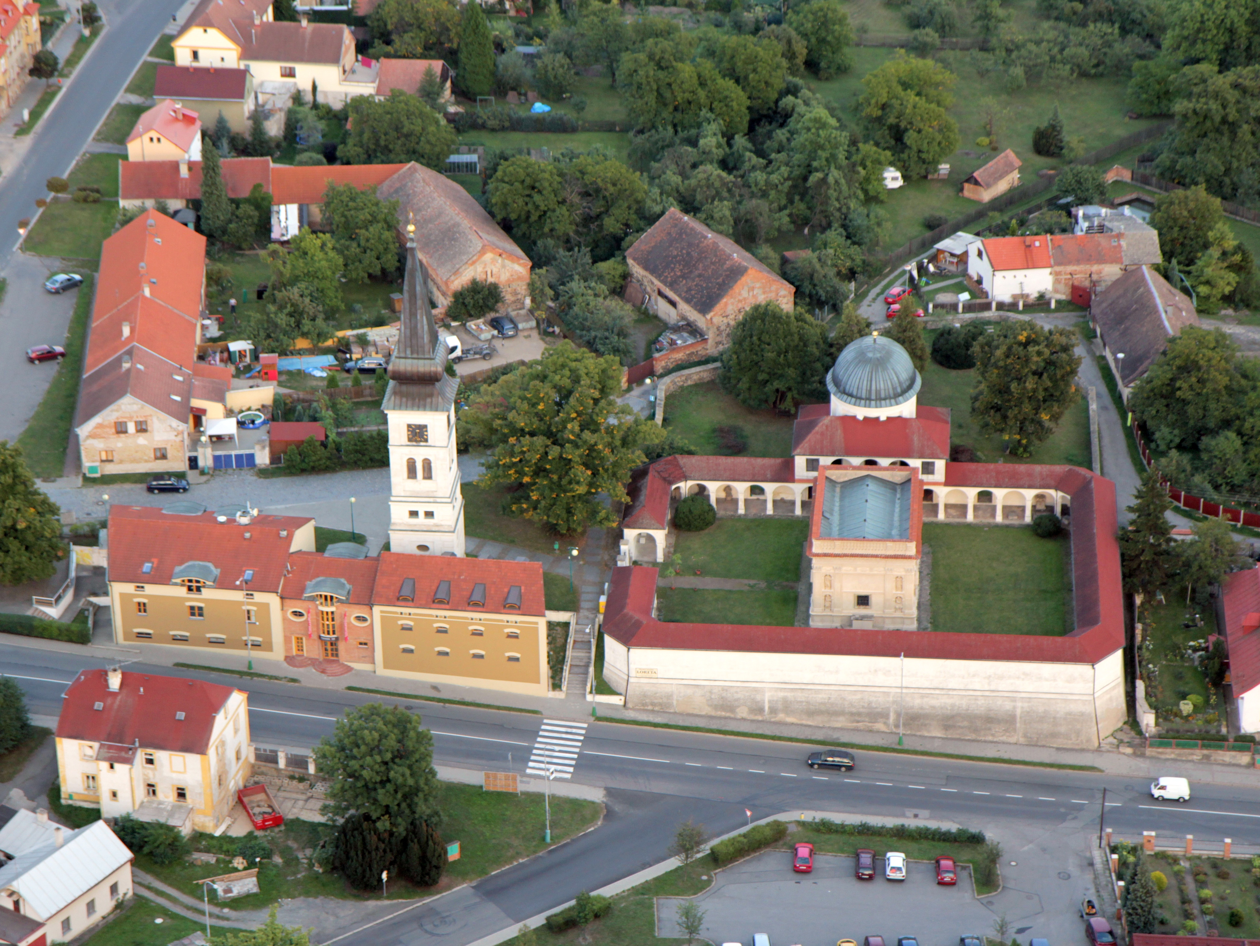 Loreta Sta. Casa (Kosmonosy), V. Kopeckého, JV část vsi, Kosmonosy